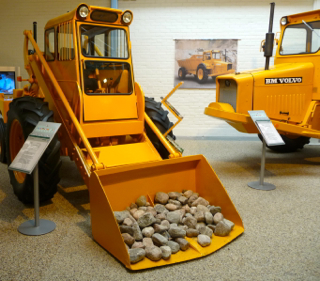 Volvo BM-fordon på Volvo Museum, Göteborg (2012)